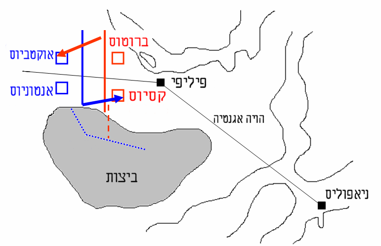 קרב פיליפי הראשון